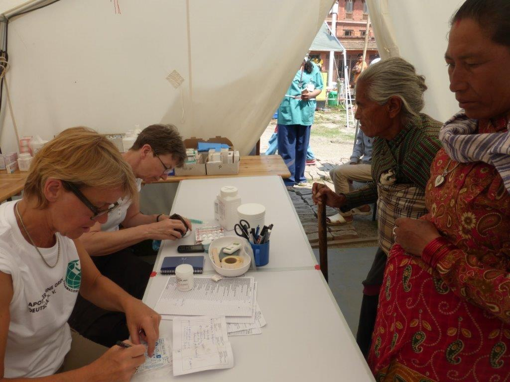 Mobiler Gesundheitsposten in Nepal